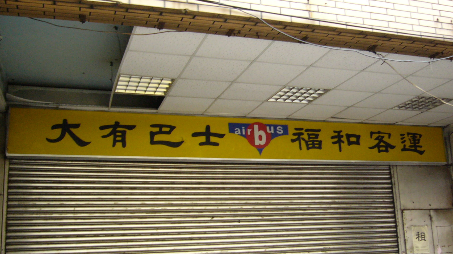 中文（台灣）: 基隆市仁愛區港西街27號，2000年代大有巴士、福和客運聯名招牌，中央圖案為大有巴士第三代商標。